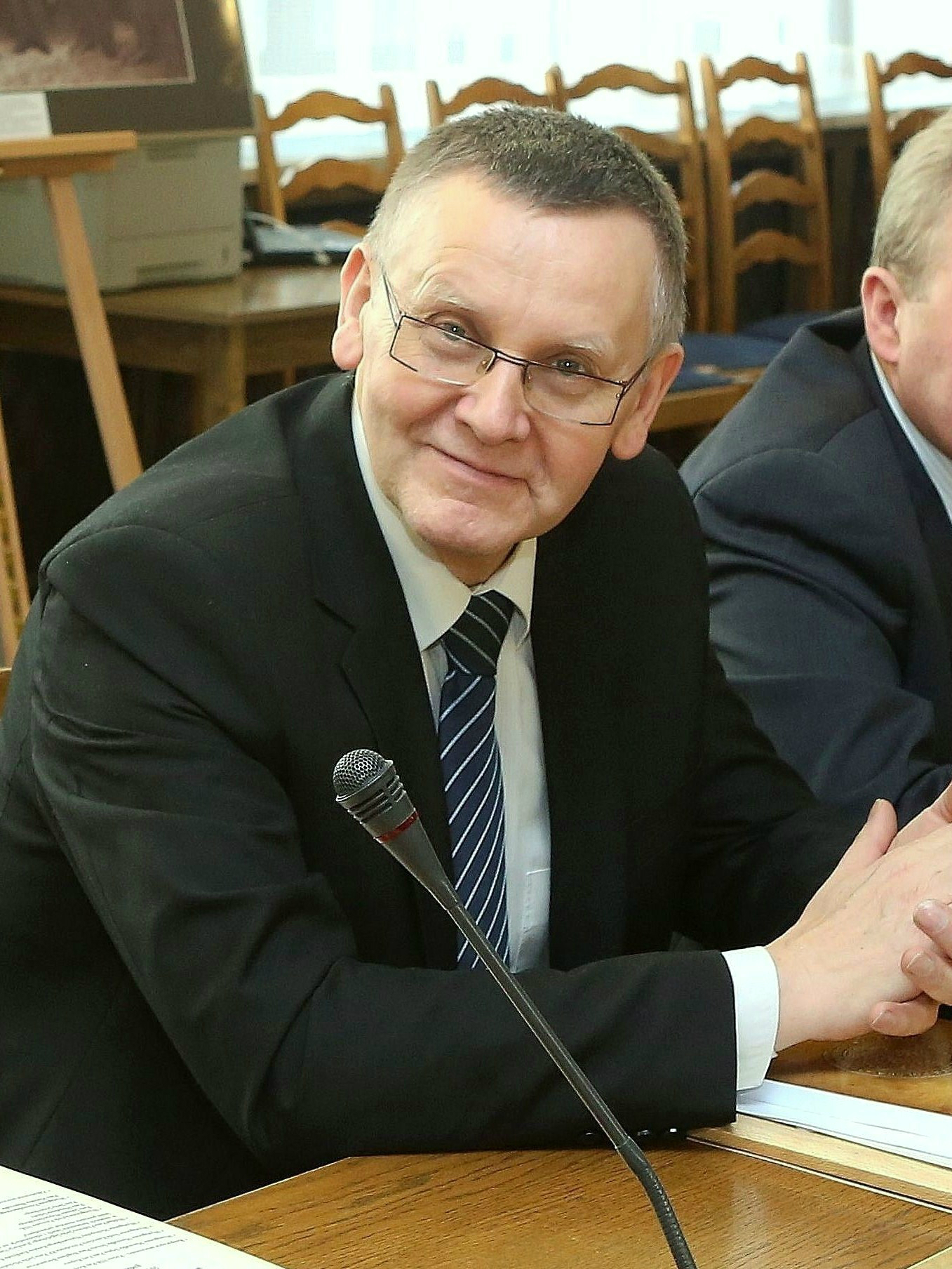 Mirosław Sekuła podczas posiedzenia Kolegium NIK z okazji 95. rocznicy powołania Izby. Sala Kolumnowa w Sejmie.